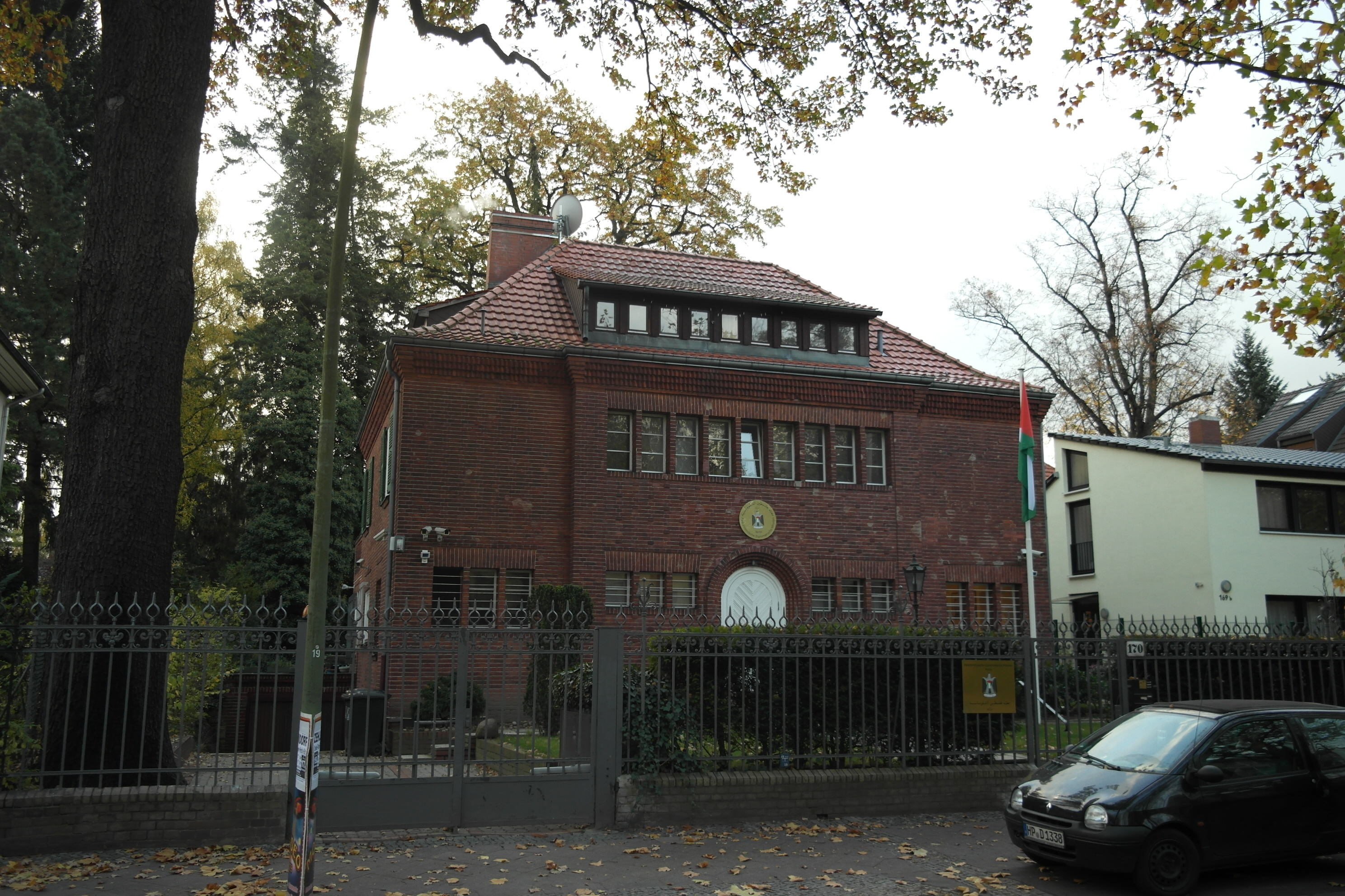 Berlin-Lichterfelde, Denkmalgeschütztes Wohnhaus Ostpreußendamm 170, heute palästinensische Vertretung